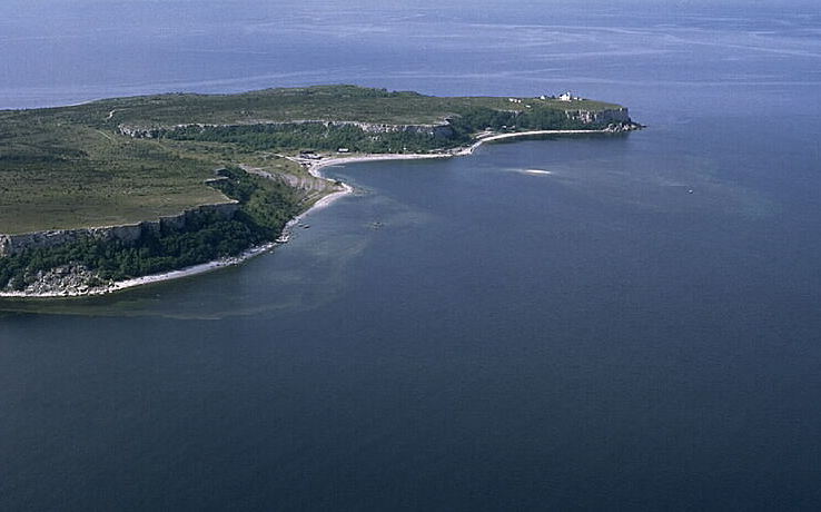 Motiv: Stora Karlsö Nyckelord: Byggnadsminnen:Statl, Flygbilder, Naturreservat, Riksintressen Kategori: Kust- och skärgårdsmiljöStora Karlsö